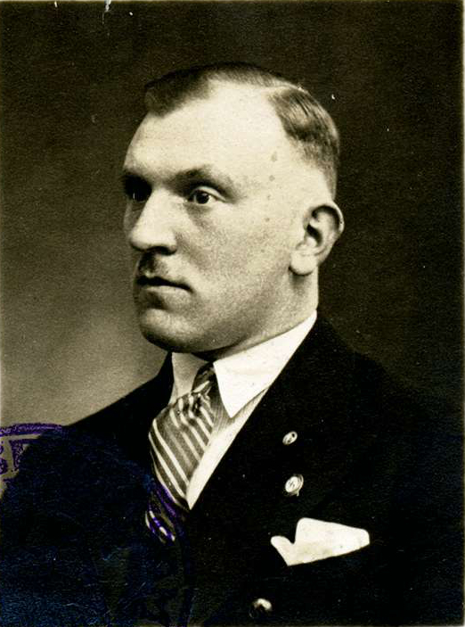 Hans Otto Feit (geboren am 12. Juni 1904 in Mannheim), deutscher Politiker (NSDAP)